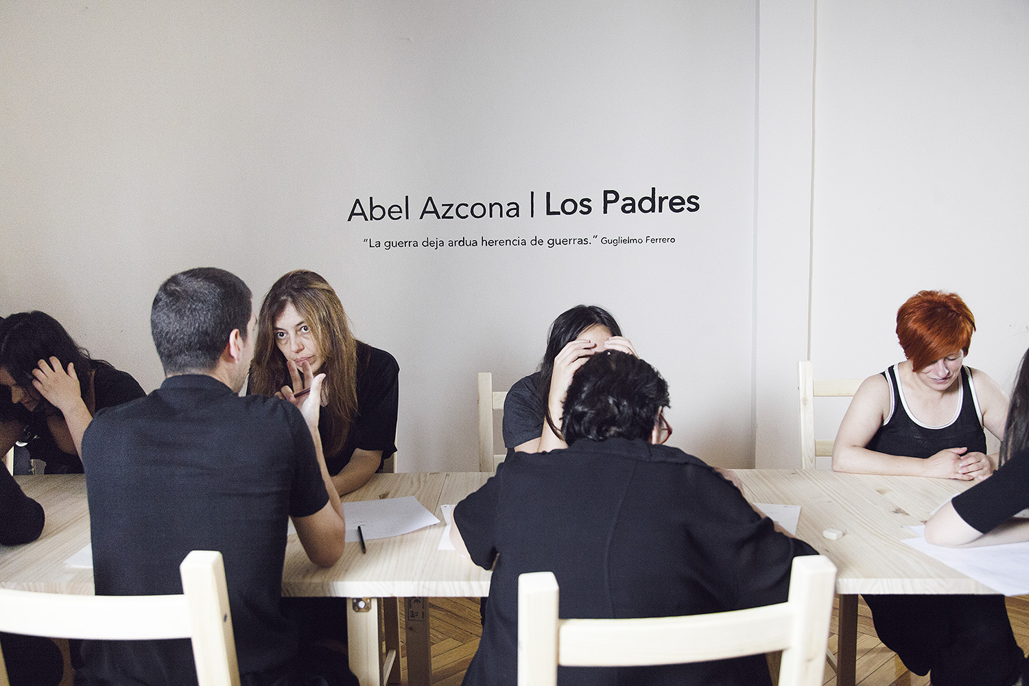 Inauguración de la exposición "Los Padres" del artista Abel Azcona en Madrid - 1